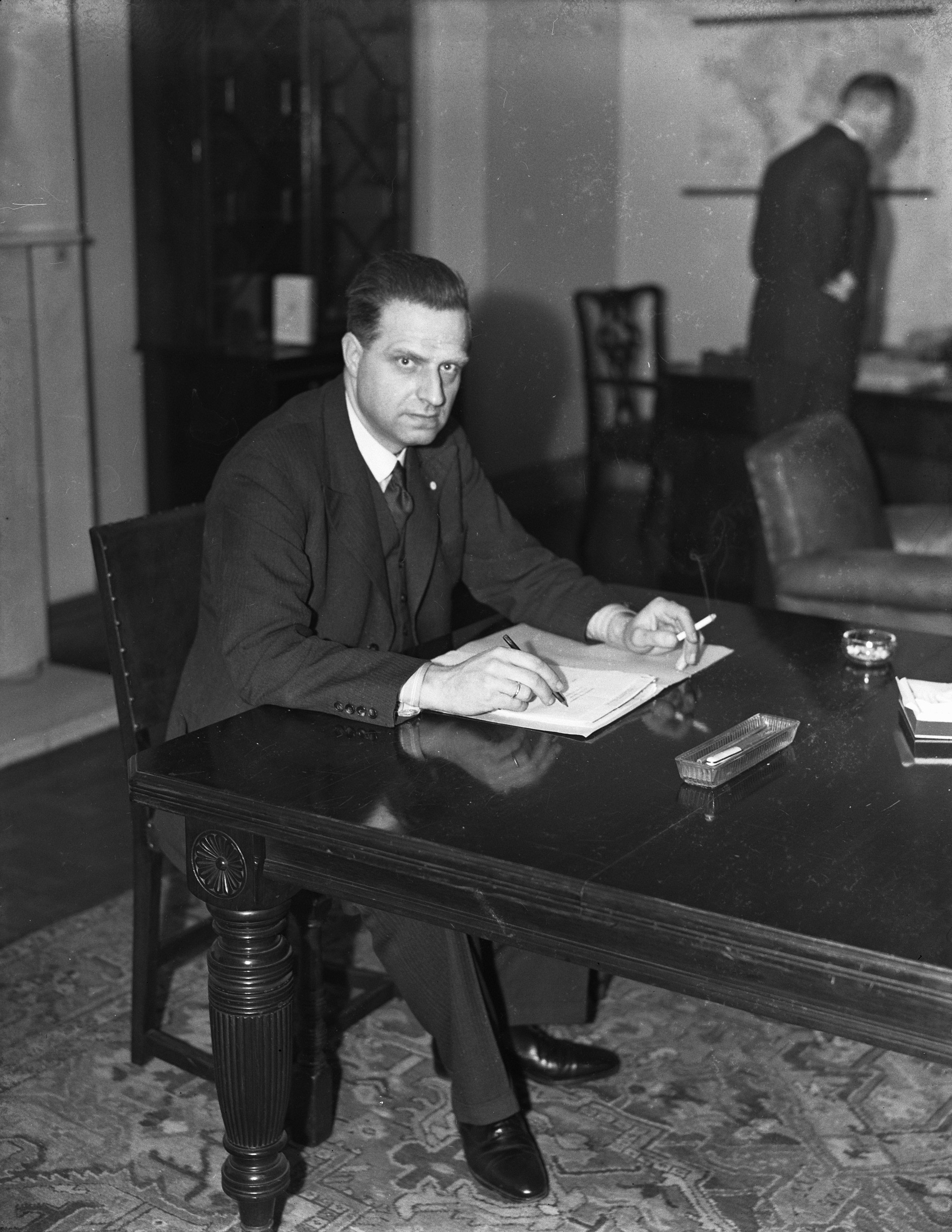 Drs. J.H. Gispen, minister van Handel, Industrie en Landbouw, periode (23 februari 1945 tot 23 juni 1945)